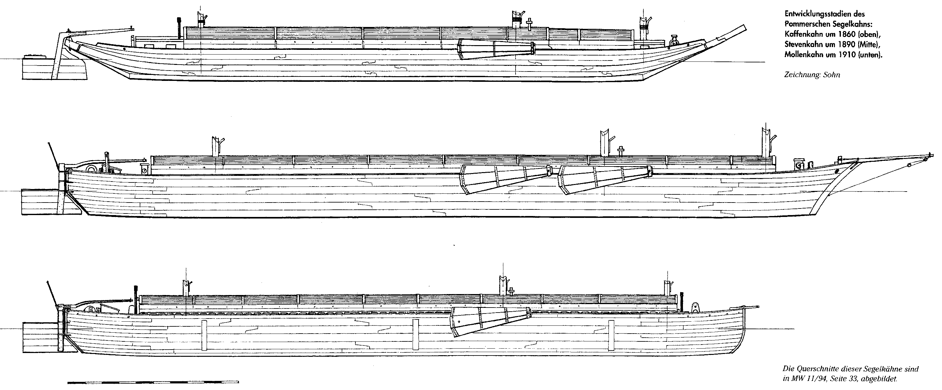 Vergleich verschiedener Haffkahntypen